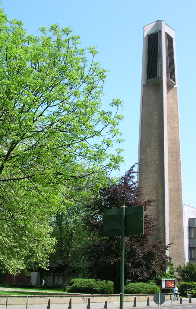 evangelische Christuskirche in Düren